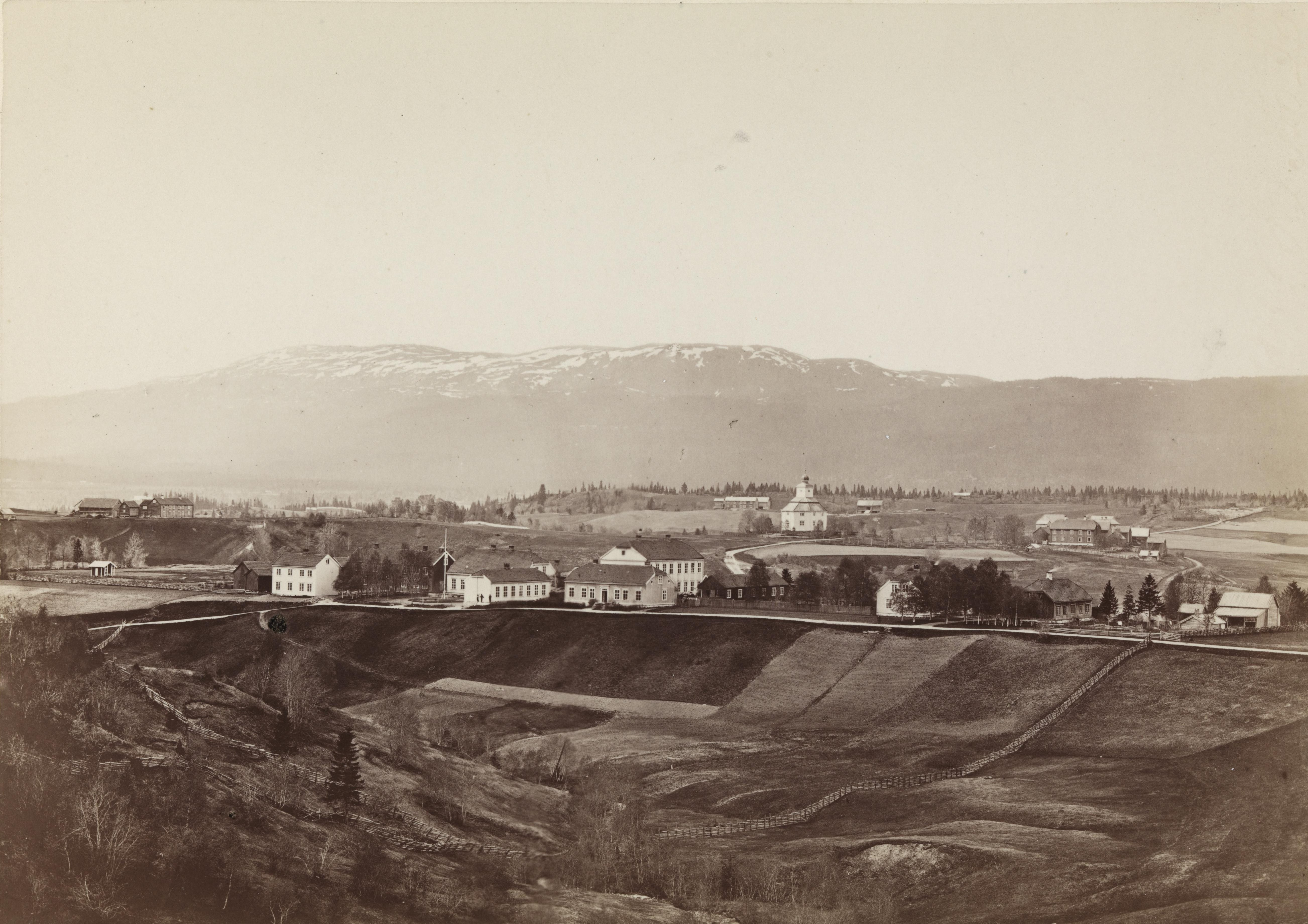 Påskrift bakside: Klæbu Sted: Klæbu Kommune: Klæbu Fylke: Sør Trøndelag Tagger: Utsikt over Klæbu med kirke i midten. landskap